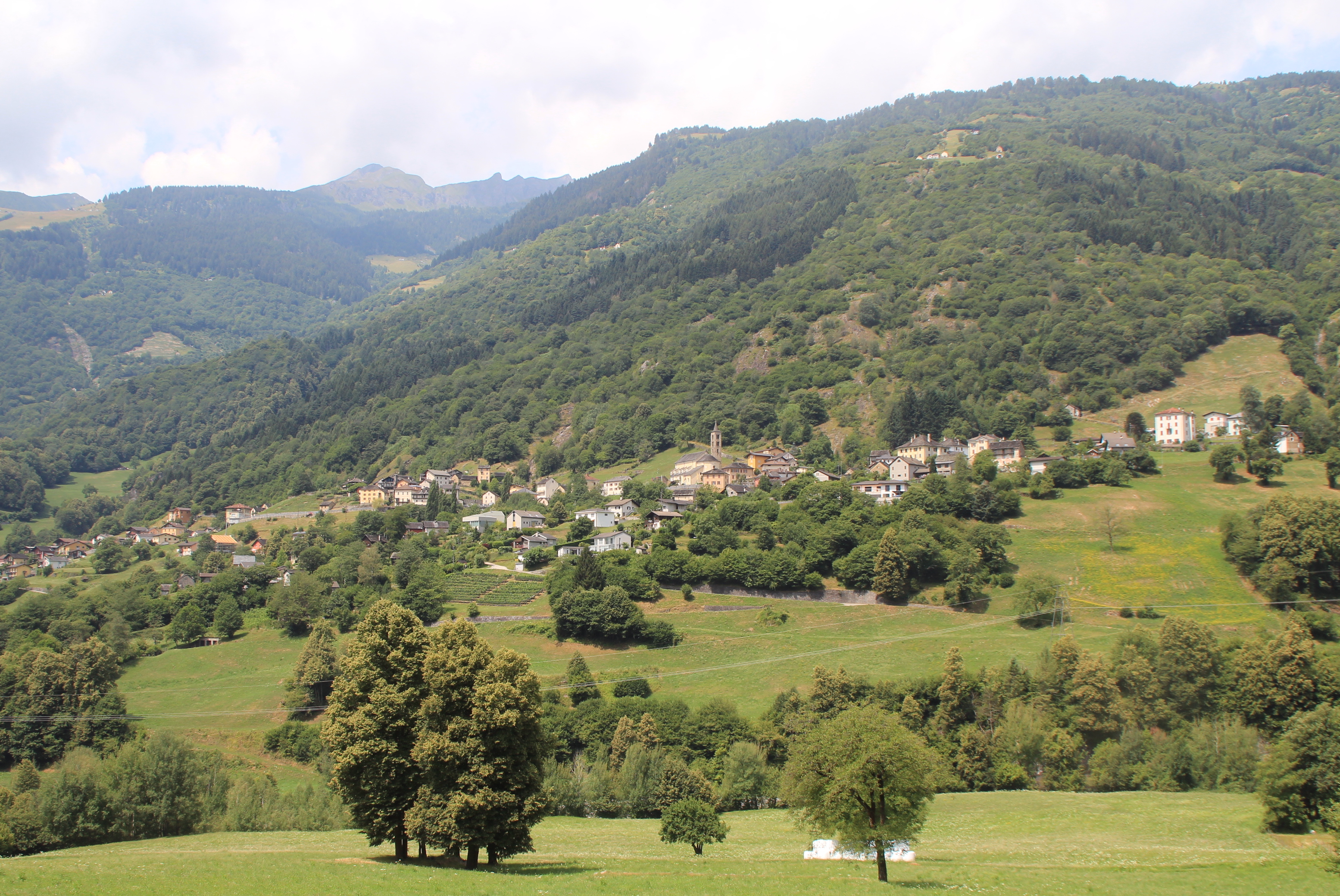 Ponto Valentino Juli 2018